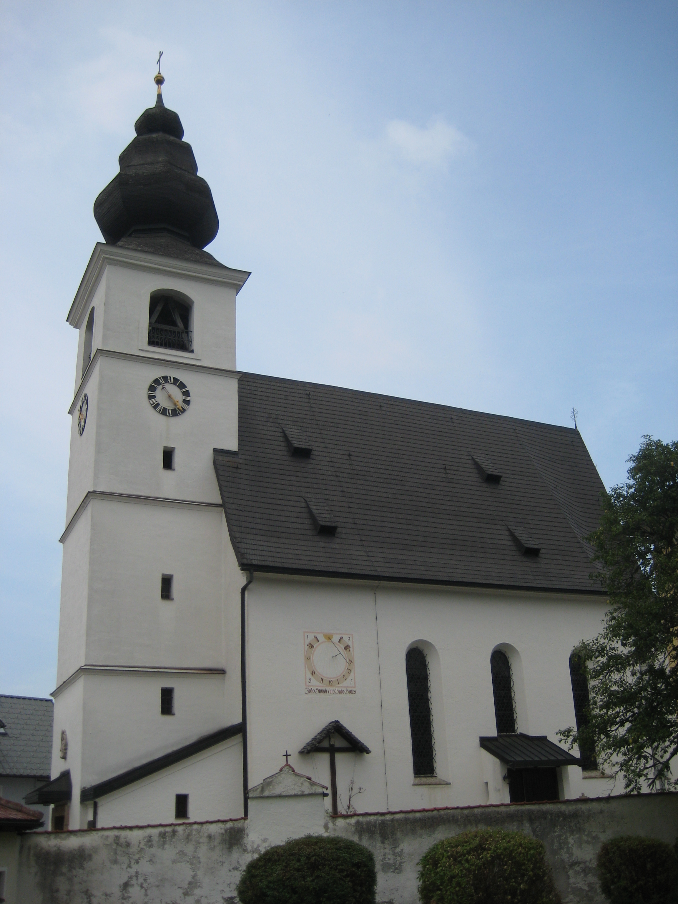 Kath. Pfarrkirche Mariä Himmelfahrt mit Friedhof